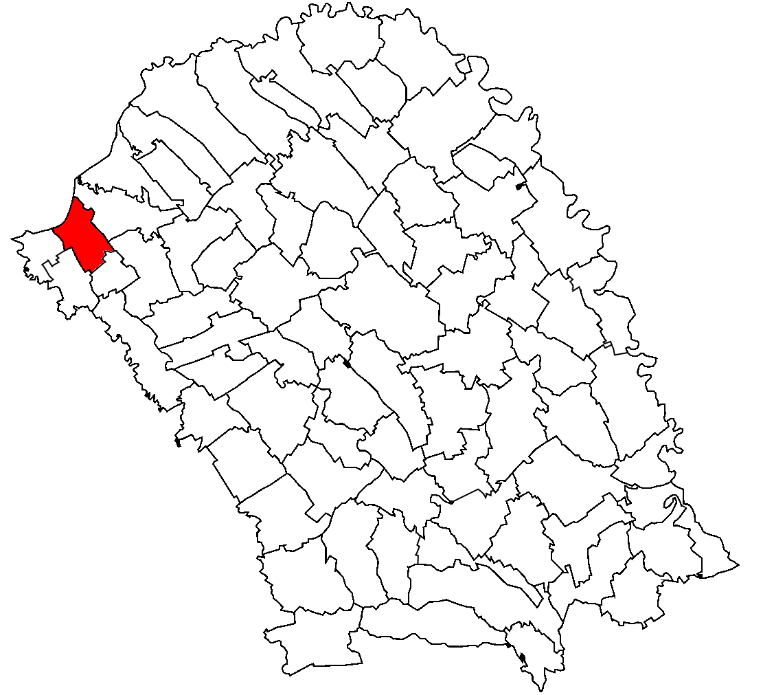 Categorie:Hărţi ale judeţului Botoşani